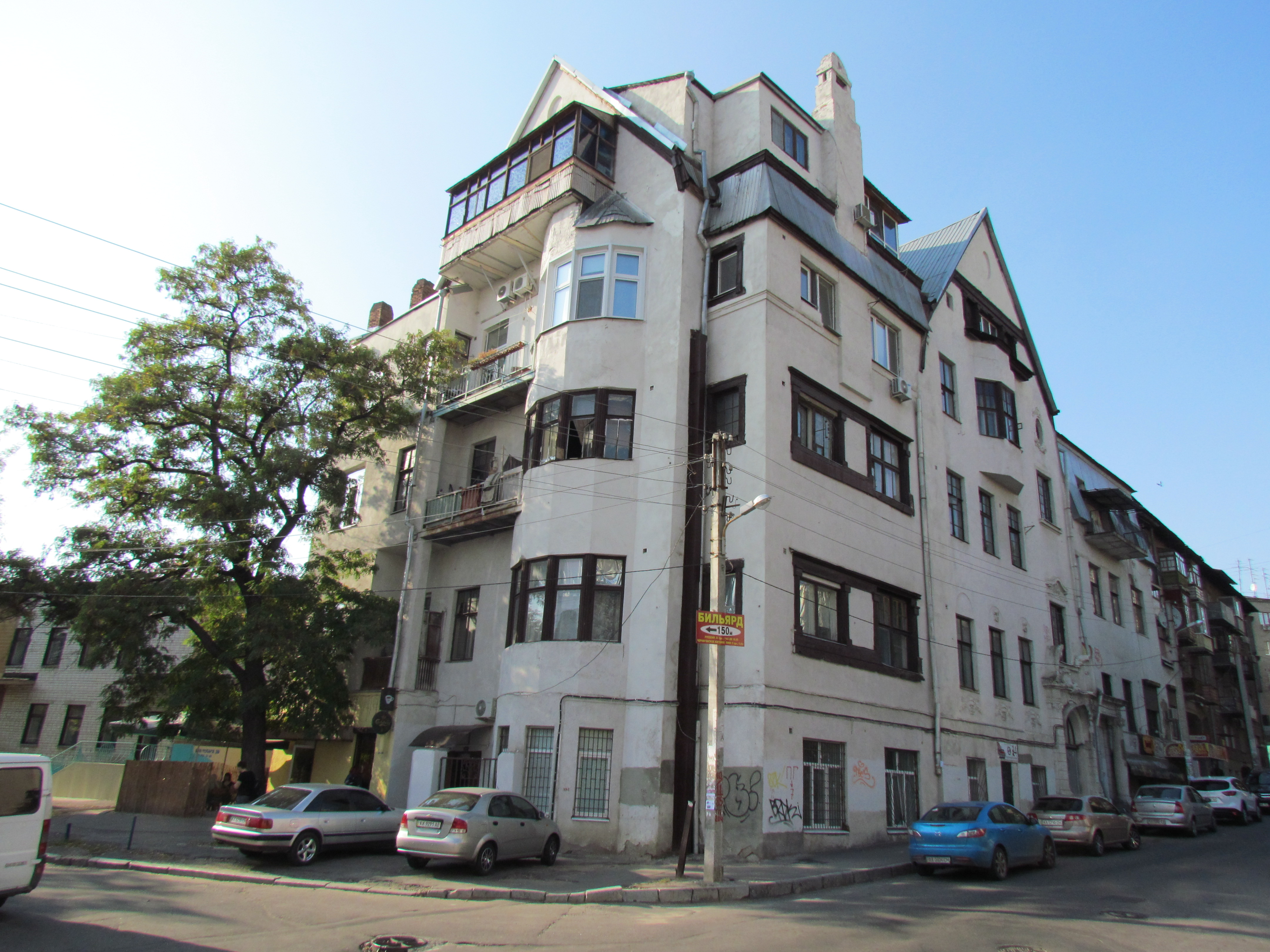 Україна, Харків, вул. М. Бажанова, 14